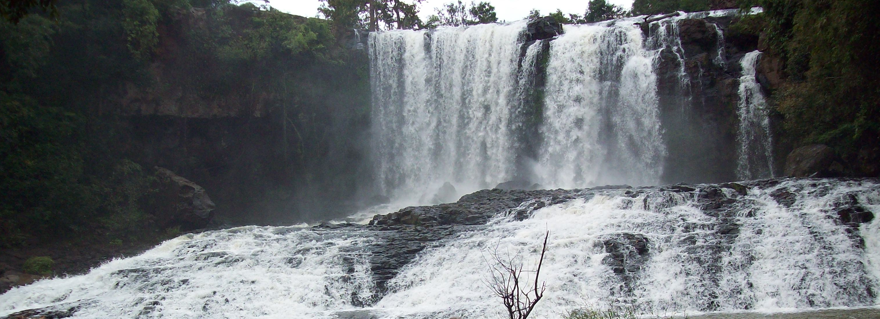 Cataratas de Bou Sra, en la provincia de Mondol Kirí, Camboya